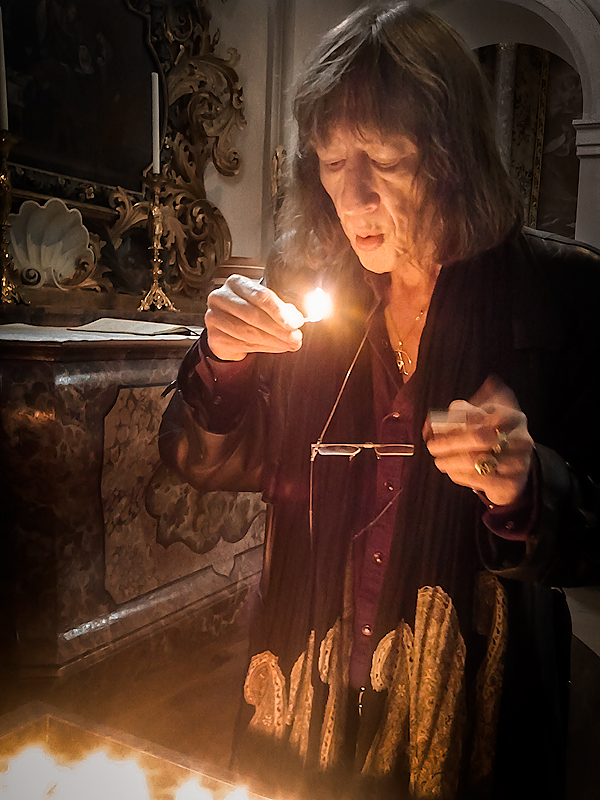 Akron C.F. Frey letztes Portraitfoto vor seinem Tod 2017